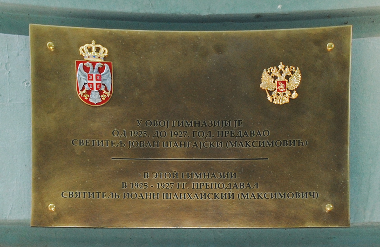 Srpski (latinica): Spomen ploča sa informacijom da je Jovan Šangajski predavao u kikidnskoj Gimnaziji. Postavljena je 2016. godine.